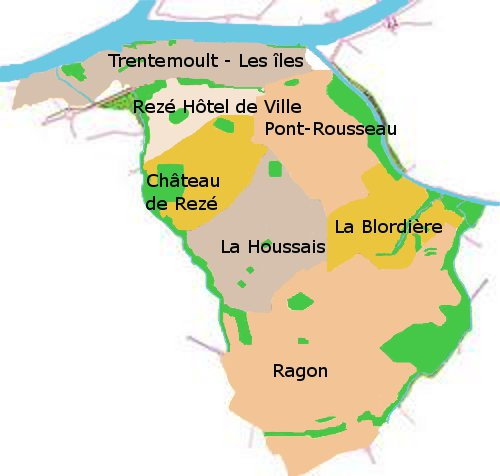 Carte des quartiers de Rezé (France, Loire-Atlantique)